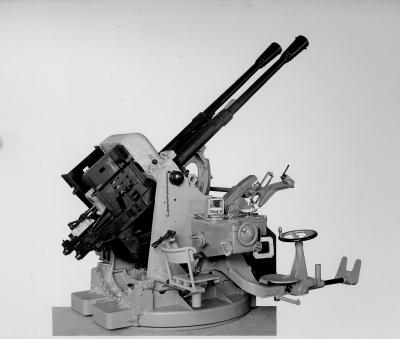 Breda 37/54 Mod. 1938